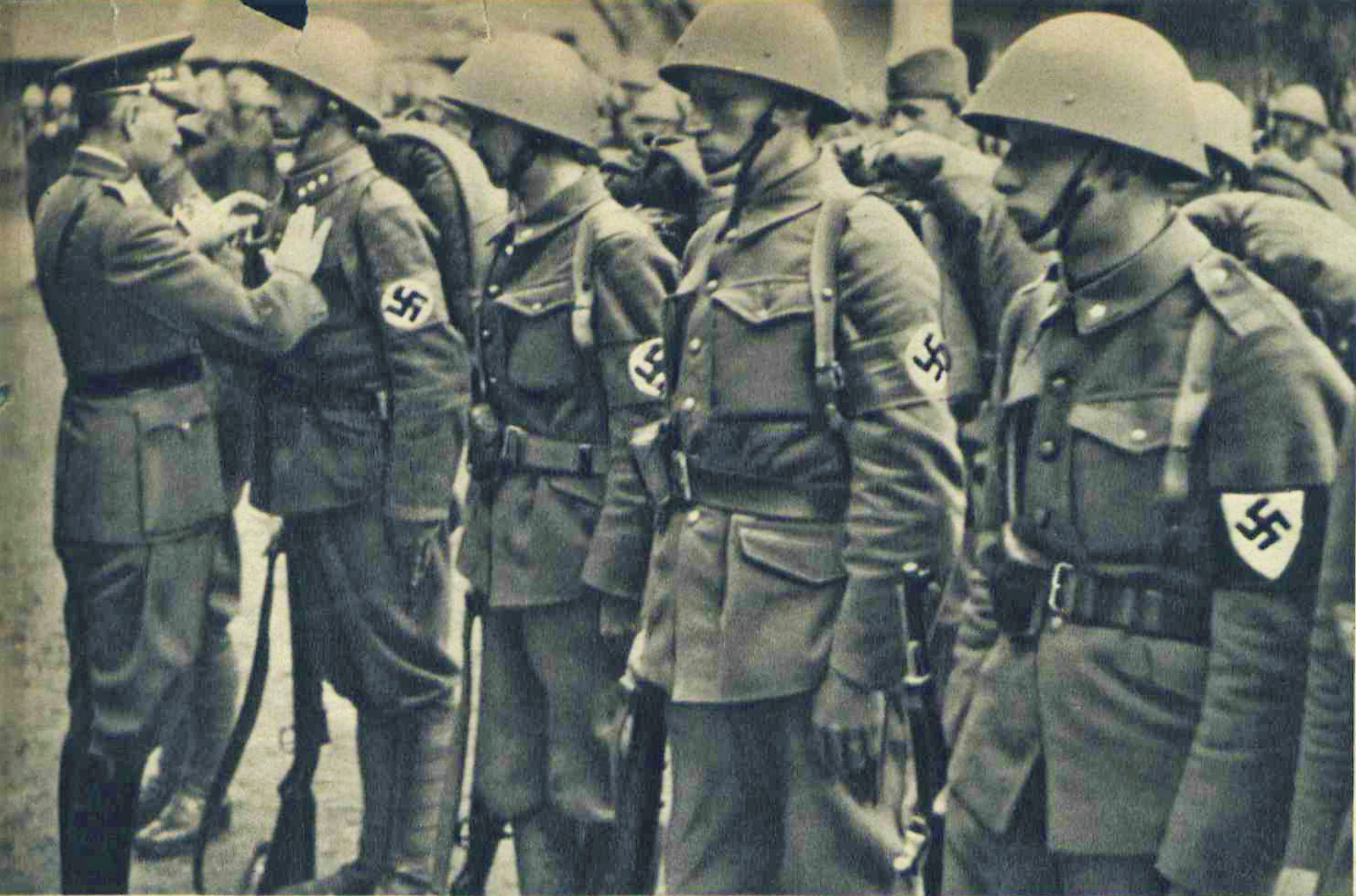 "Minister národnej obrany, generál Čatloš, vyznamenáva nemeckých vojakov slovenskej armády"